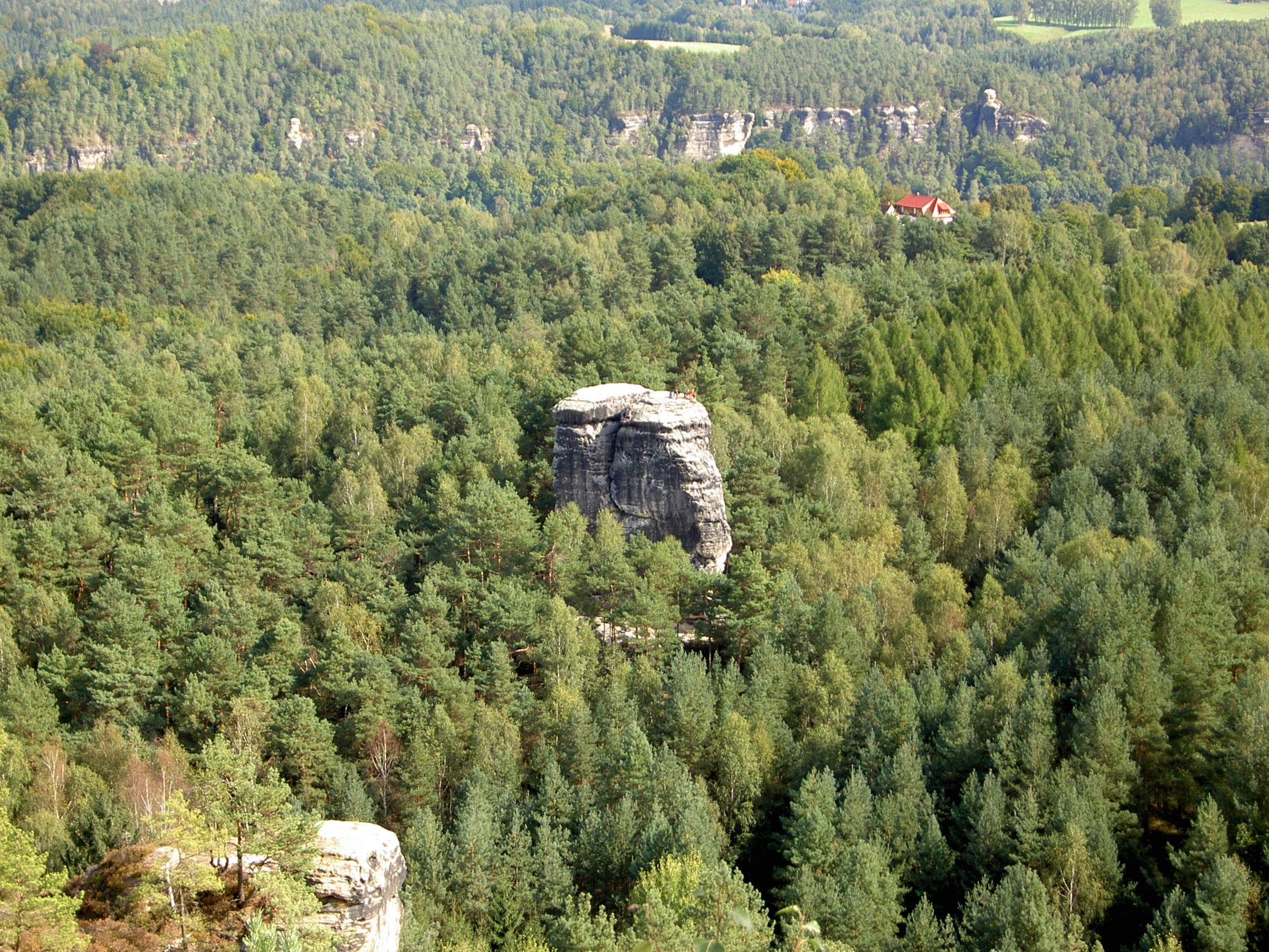 Nonne vom Rauenstein aus fotografiert